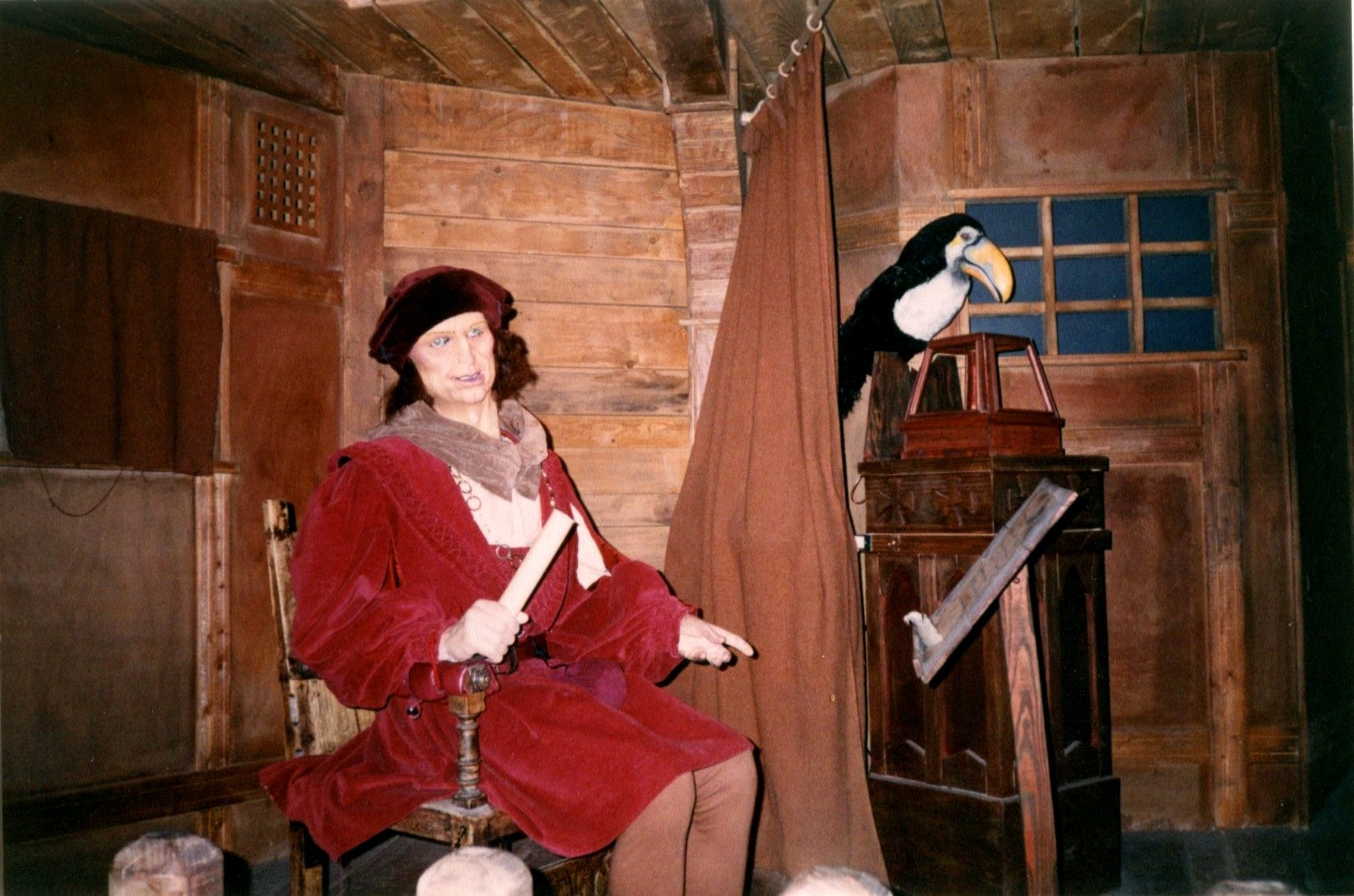 FuturoscopeChristopheC